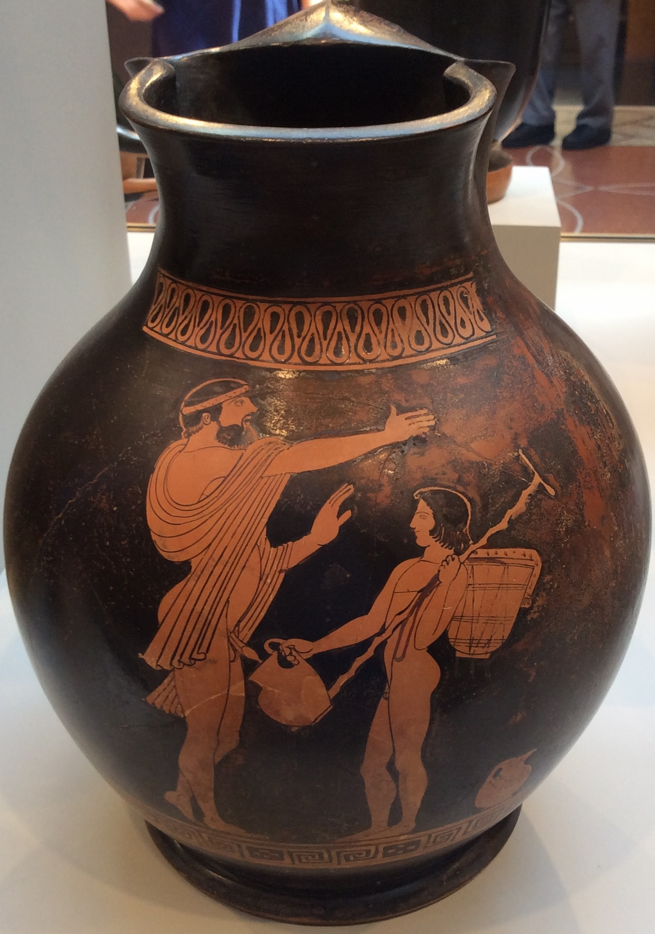 Greek vase at Getty Villa: drunken man singing and urinating. 86.AE.237